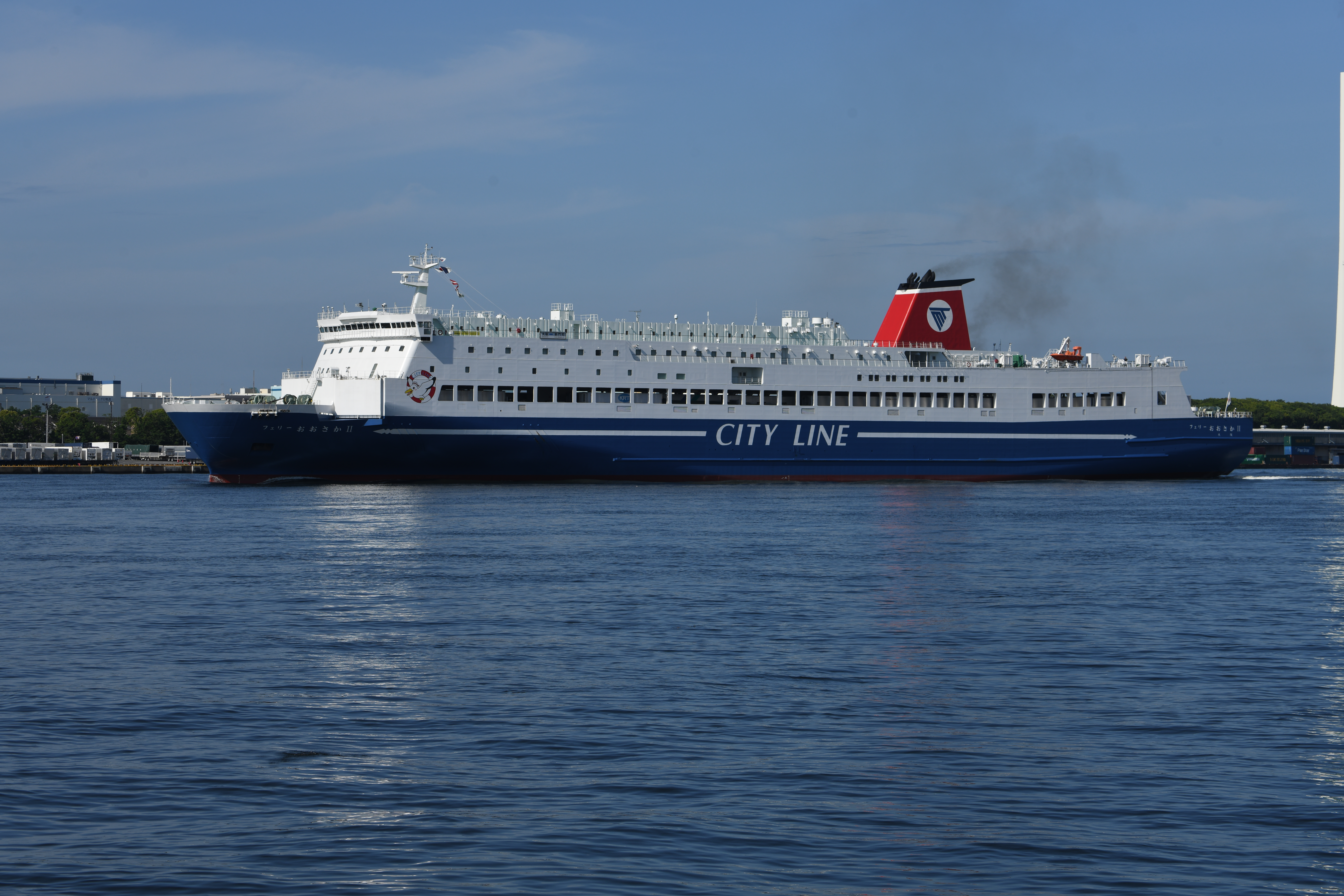 大阪南港に入港する名門大洋フェリー・フェリーおおさか2